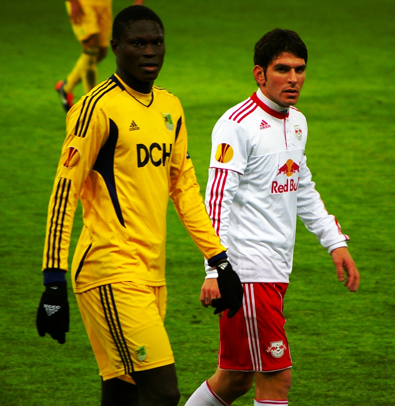 Europaleague 2011/12 16tel Finale